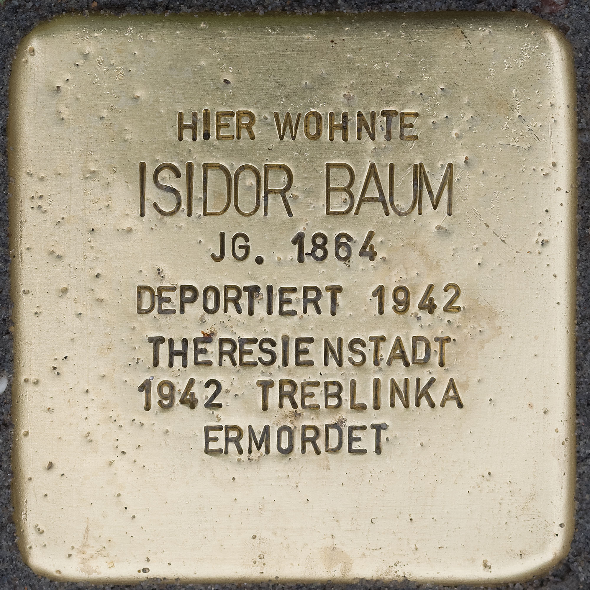 Stolpersteine Suechteln: Baum, Isidor